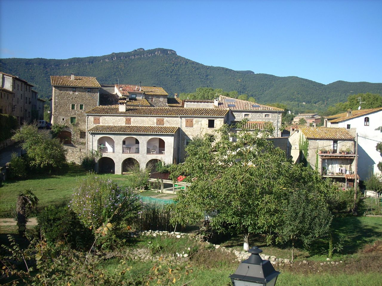 Vista de Mieres (Girona, Catalunya)